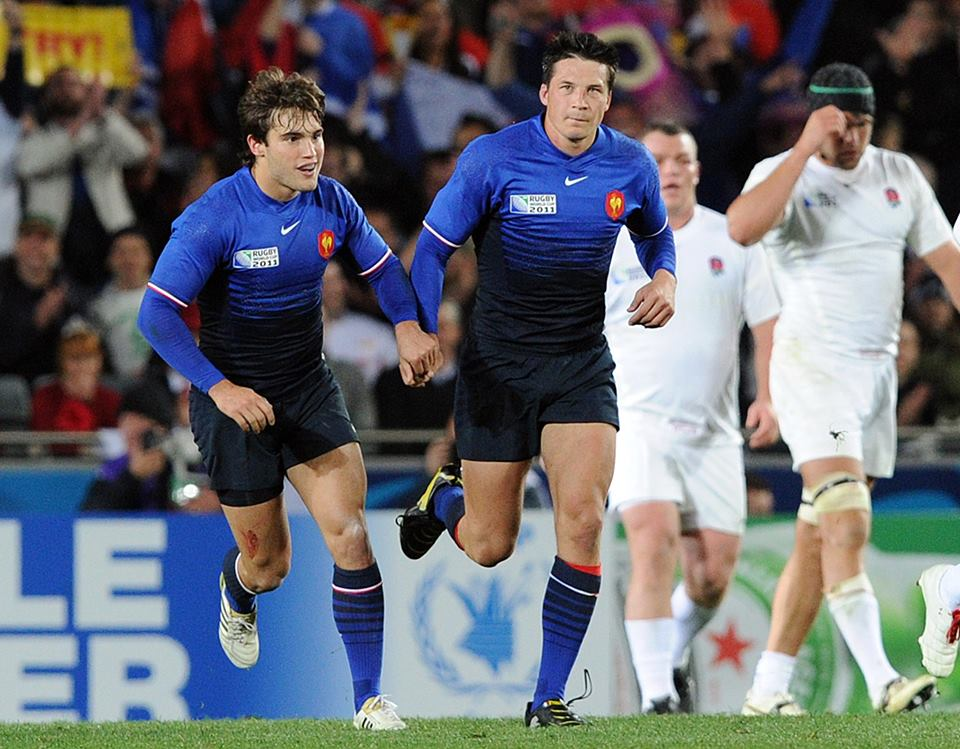 Trinh-Duc